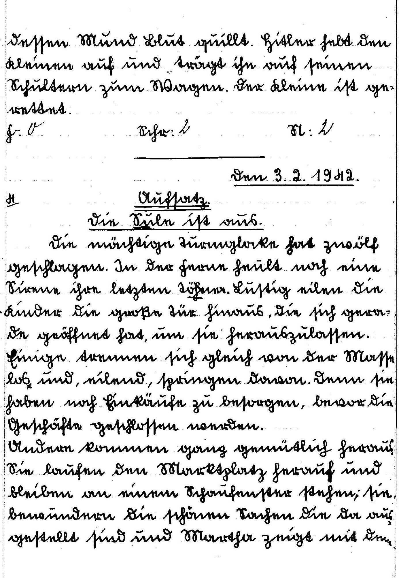 Exemple d'écriture Sütterlin dans le cahier d'une écolière alsacienne de 13 ans, en février 1942. Dès mars 42, dans le même cahier, cette écriture était abandonnée.